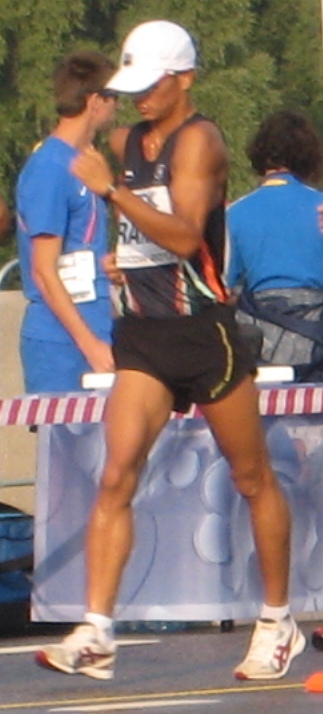 Чемпионат мира по лёгкой атлетике 2013. Ходьба 50 км, мужчины: Басанта Бахадут Рана